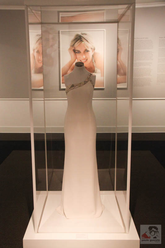 Lima - Perú